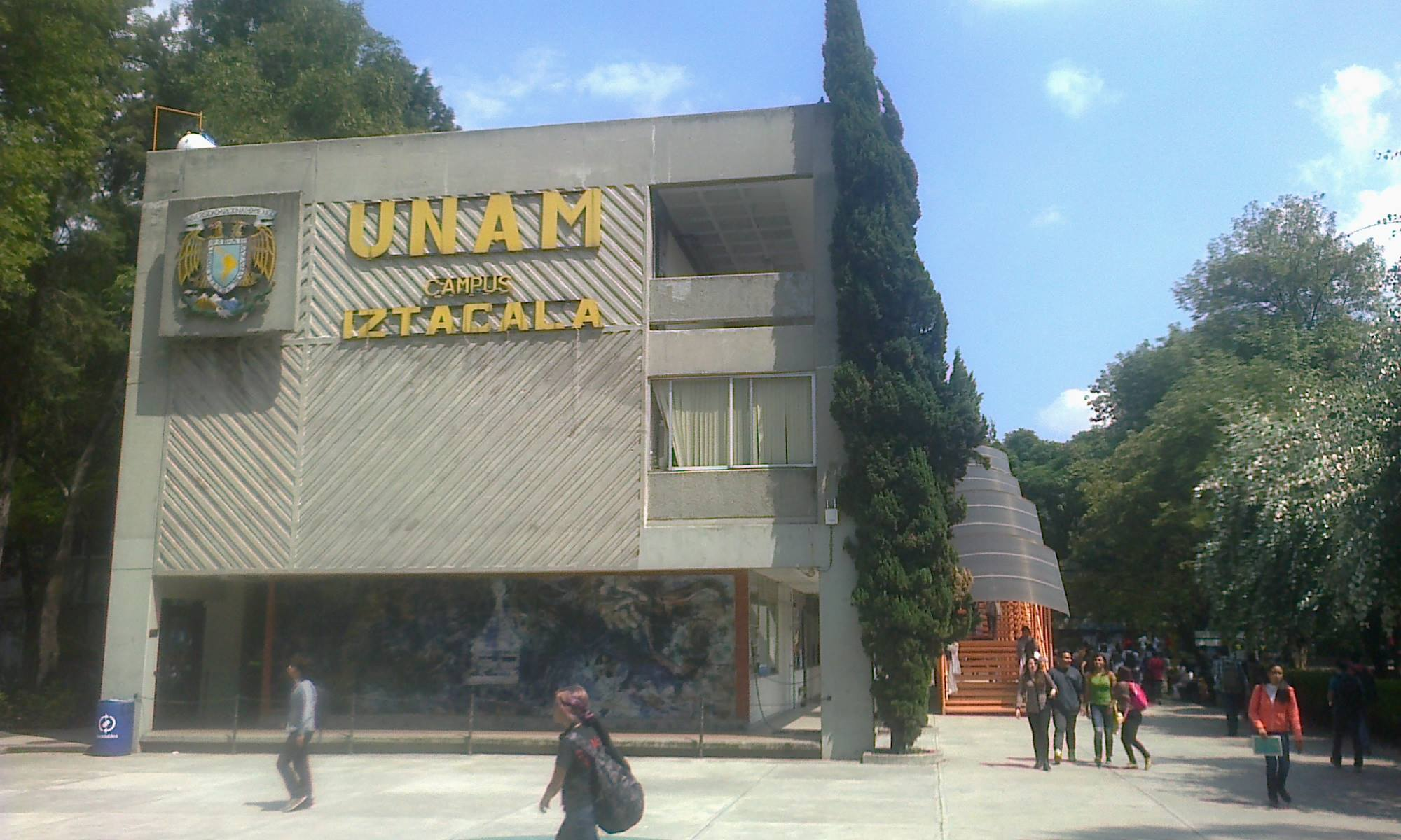 Facultad de Estudios Superiores Iztacala.